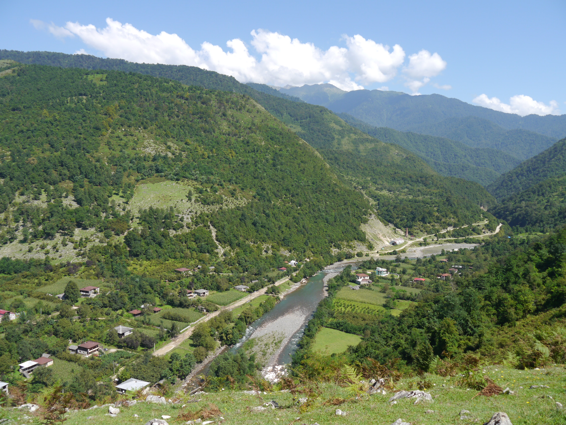 Blick von einem Dorfhügel ins Lugella-Tal